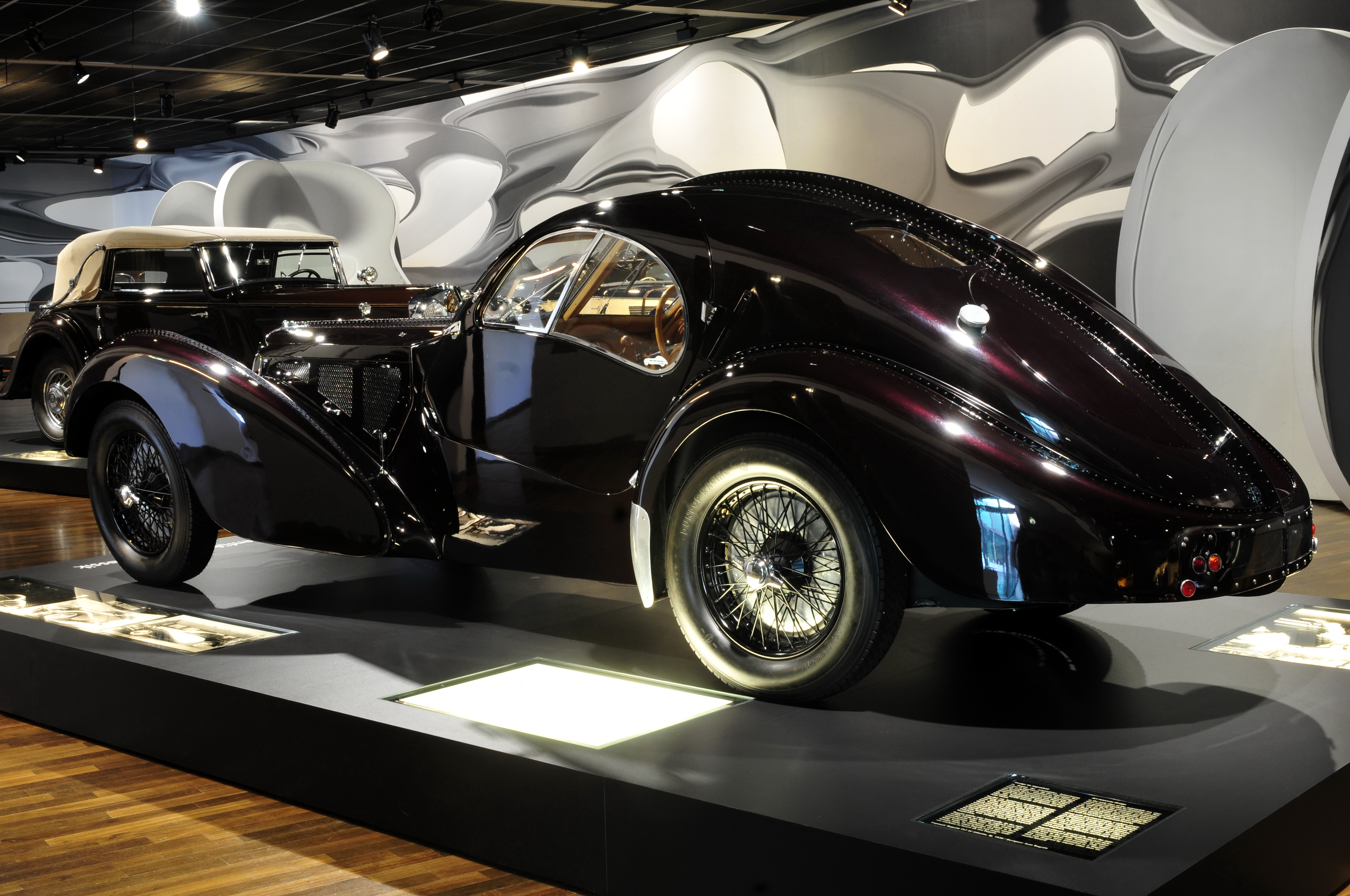 Zeithaus in der Autostadt Wolfsburg